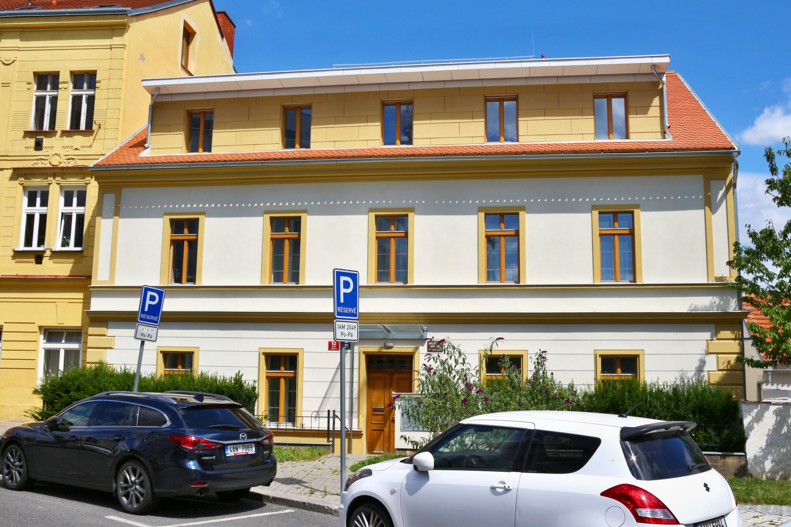 Kostel Narození Panny Marie v Michli